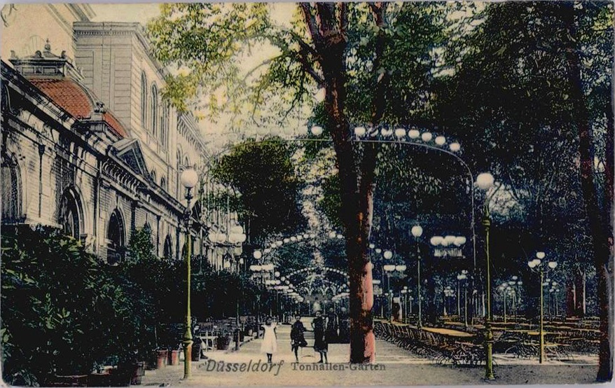 Düsseldorf, Tonhallengarten. Postkarte Vorderseite